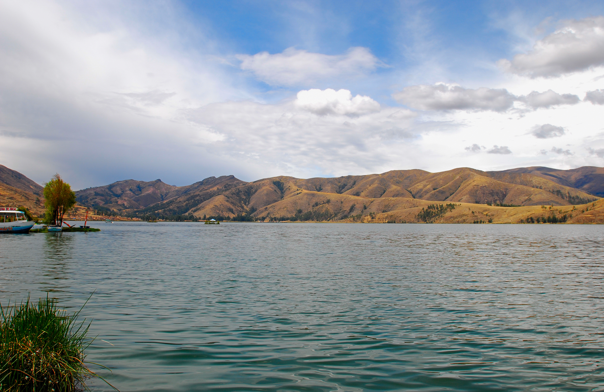 Laguna de Paca en Jauja, Junin, Peru